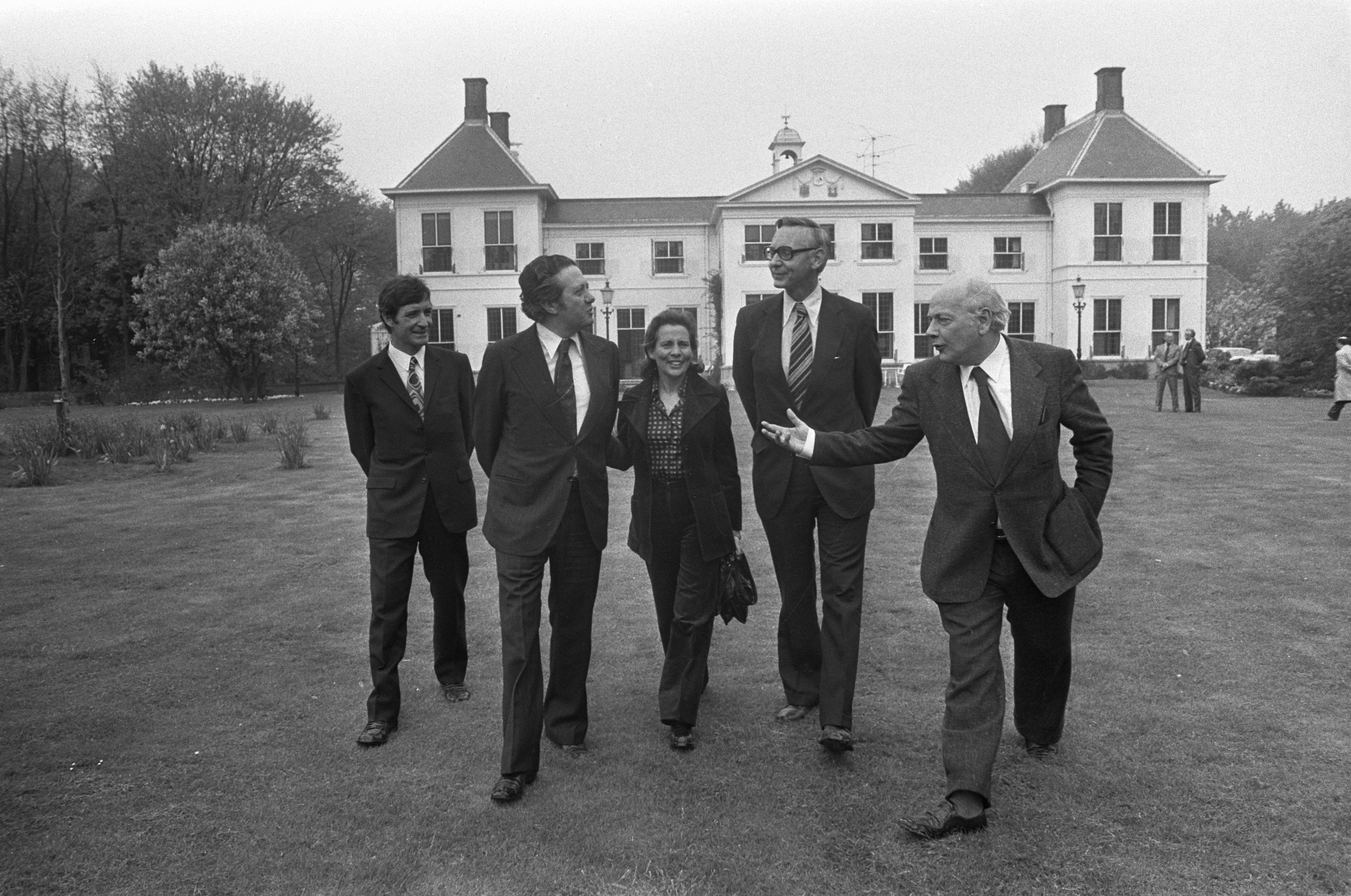 Collectie / Archief : Fotocollectie Anefo Reportage / Serie : [ onbekend ] Beschrijving : Mario Soares door Den Uyl in Catshuis ontvangen; vlnr secretaris van Soares, Mario Soares , mevrouw Soares, Van der Stoel en Den Uyl voor Catshuis wandelend Datum : 4 mei 1974 Locatie : Den Haag, Zuid-Holland Trefwoorden : ministers, ontvangsten, premiers, wandelingen Persoonsnaam : Soares, Mario, Stoel, Max van der, Uy Den Fotograaf : Peters, Hans / Anefo Auteursrechthebbende : Nationaal Archief Materiaalsoort : Negatief (zwart/wit) Nummer archiefinventaris : bekijk toegang 2.24.01.05 Bestanddeelnummer : 927-1690